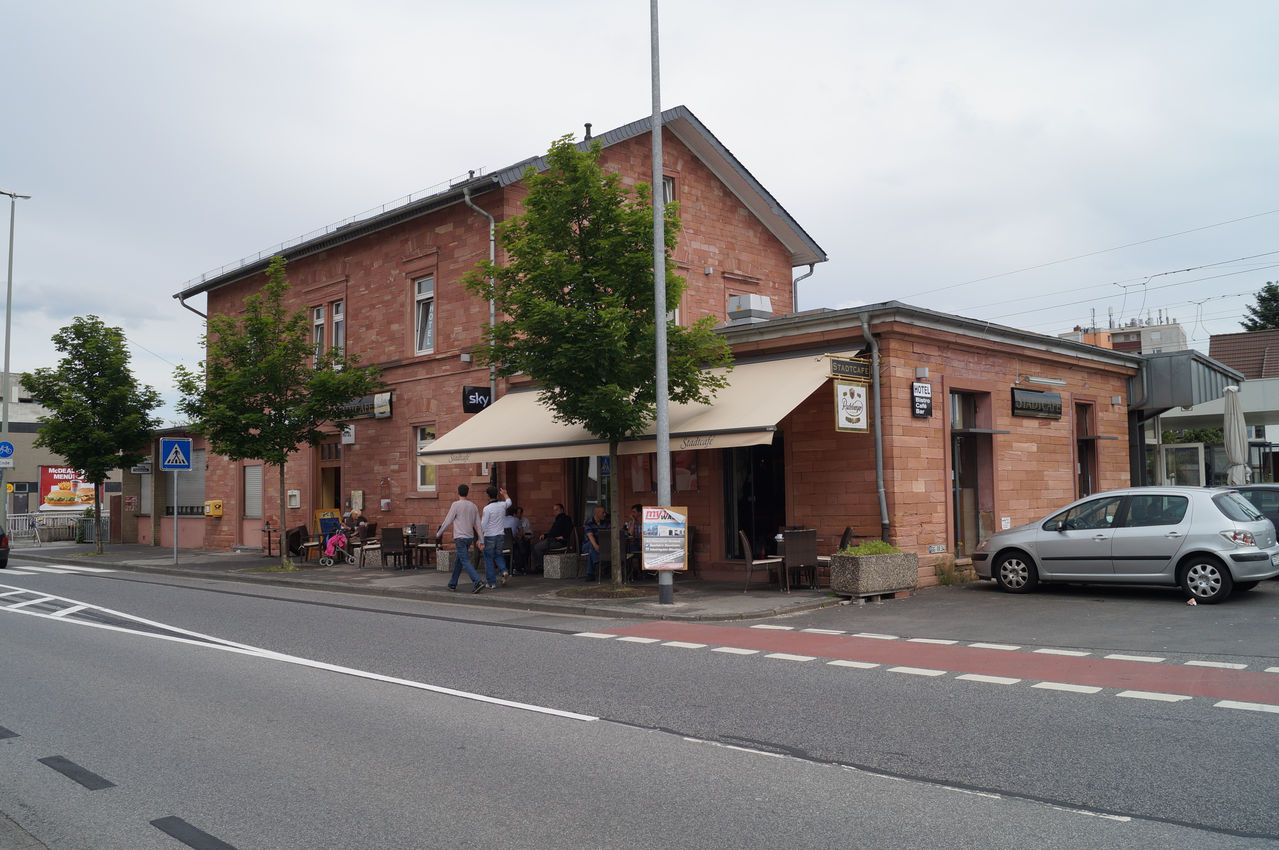 Das Bahnhofsgebäude des Bahnhofs Kelsterbach